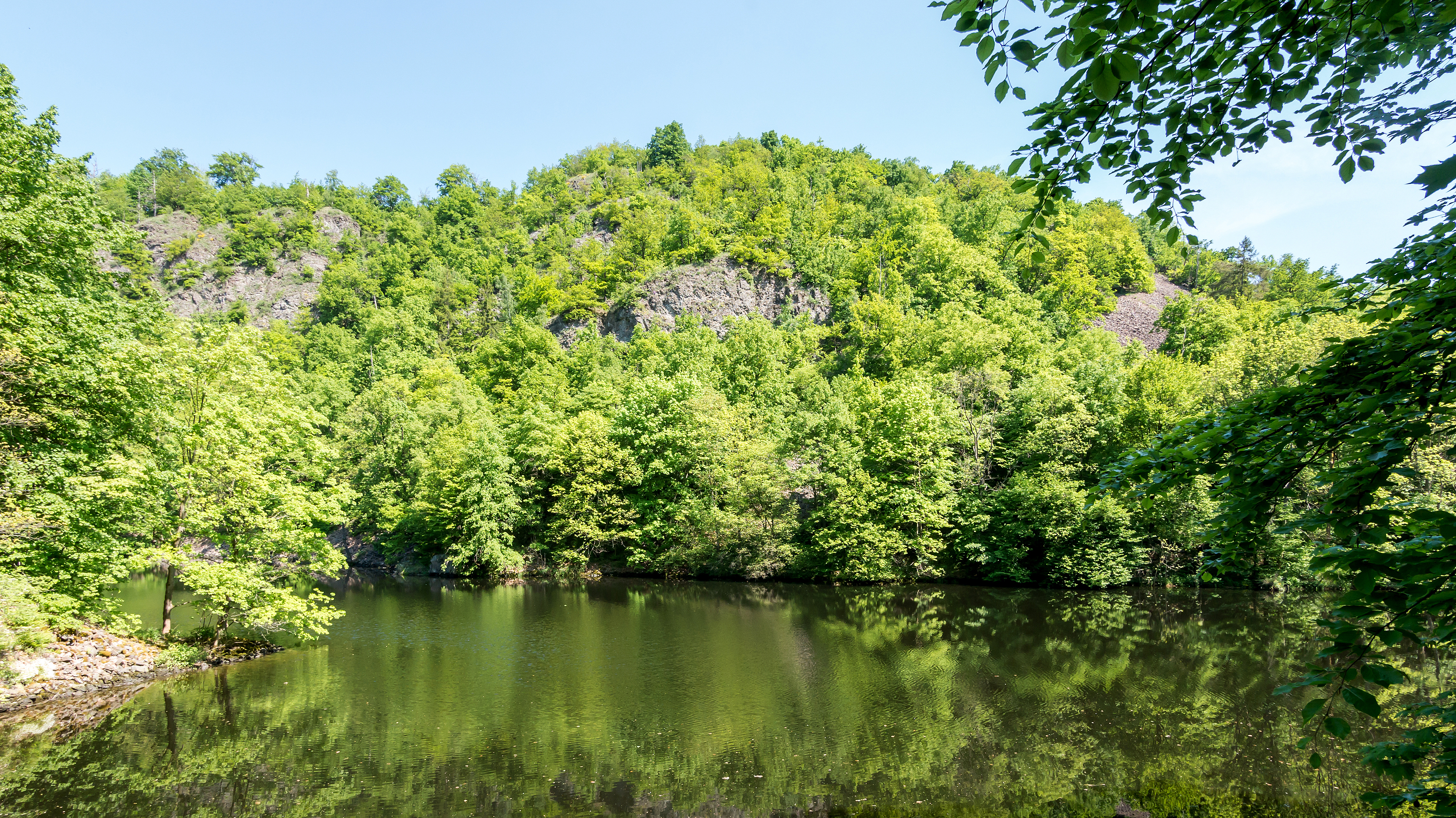 Blick übers Ausgleichsbecken Burgkhammer zur Südspitze des Bleibergs im Naturschutzgebiet „Bleiberg“ in Burgk (Thüringen); auch gelegen im FFH-Gebiet „Burgk-Bleiberg-Kobersfelsen“ und im Landschaftsschutzgebiet „Obere Saale“; I